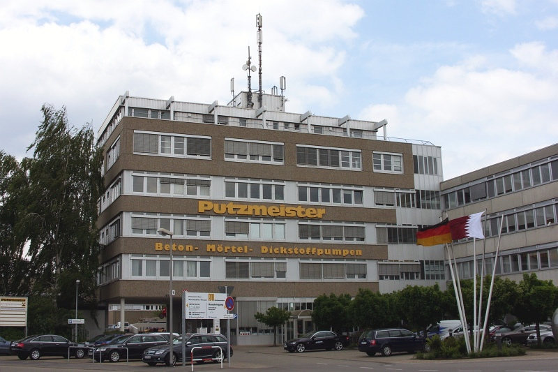 Fa. Putzmeister, Aichtal-Aich